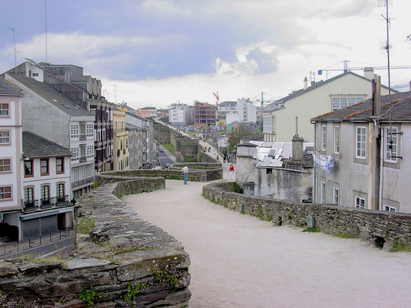 Muralla romana de Lugo, Galicia (España) Publish by= Luis Miguel Bugallo Sánchez. Self made